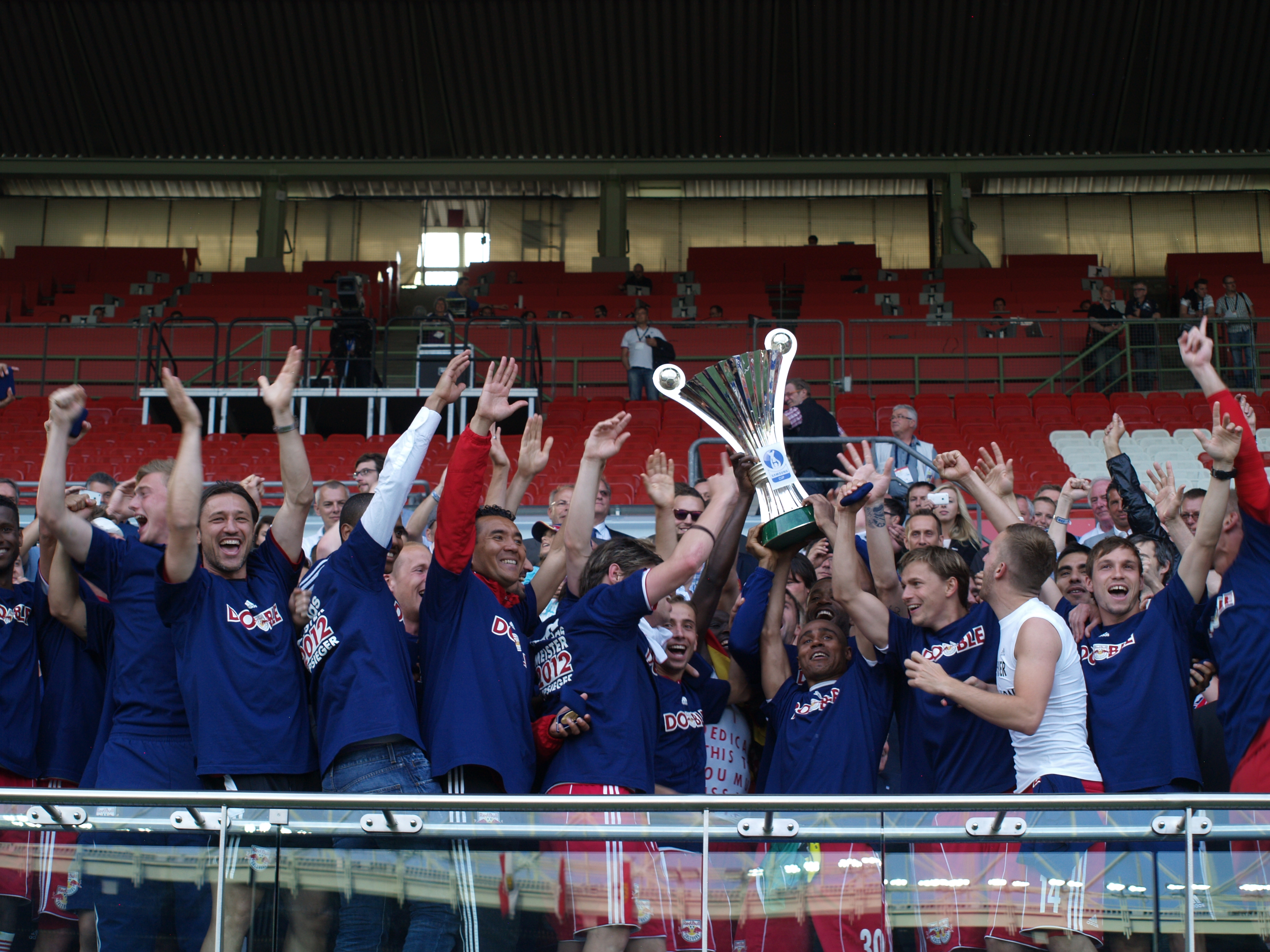 ÖFB-Cupfinale 2012: Pokalübergabe